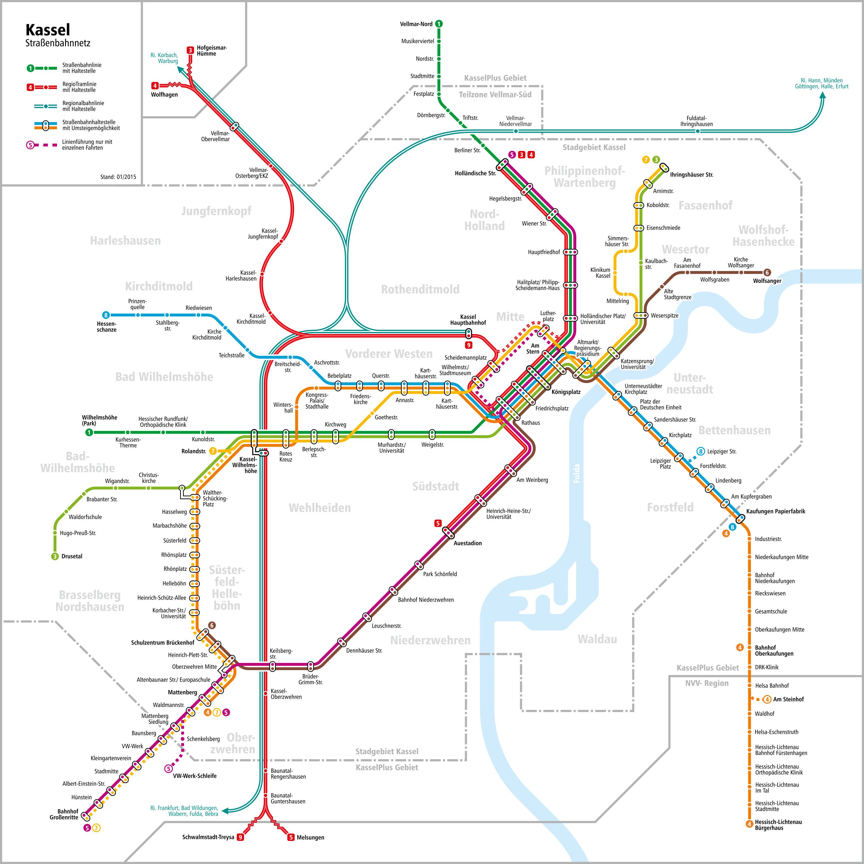 Straßenbahnnetz Kassel